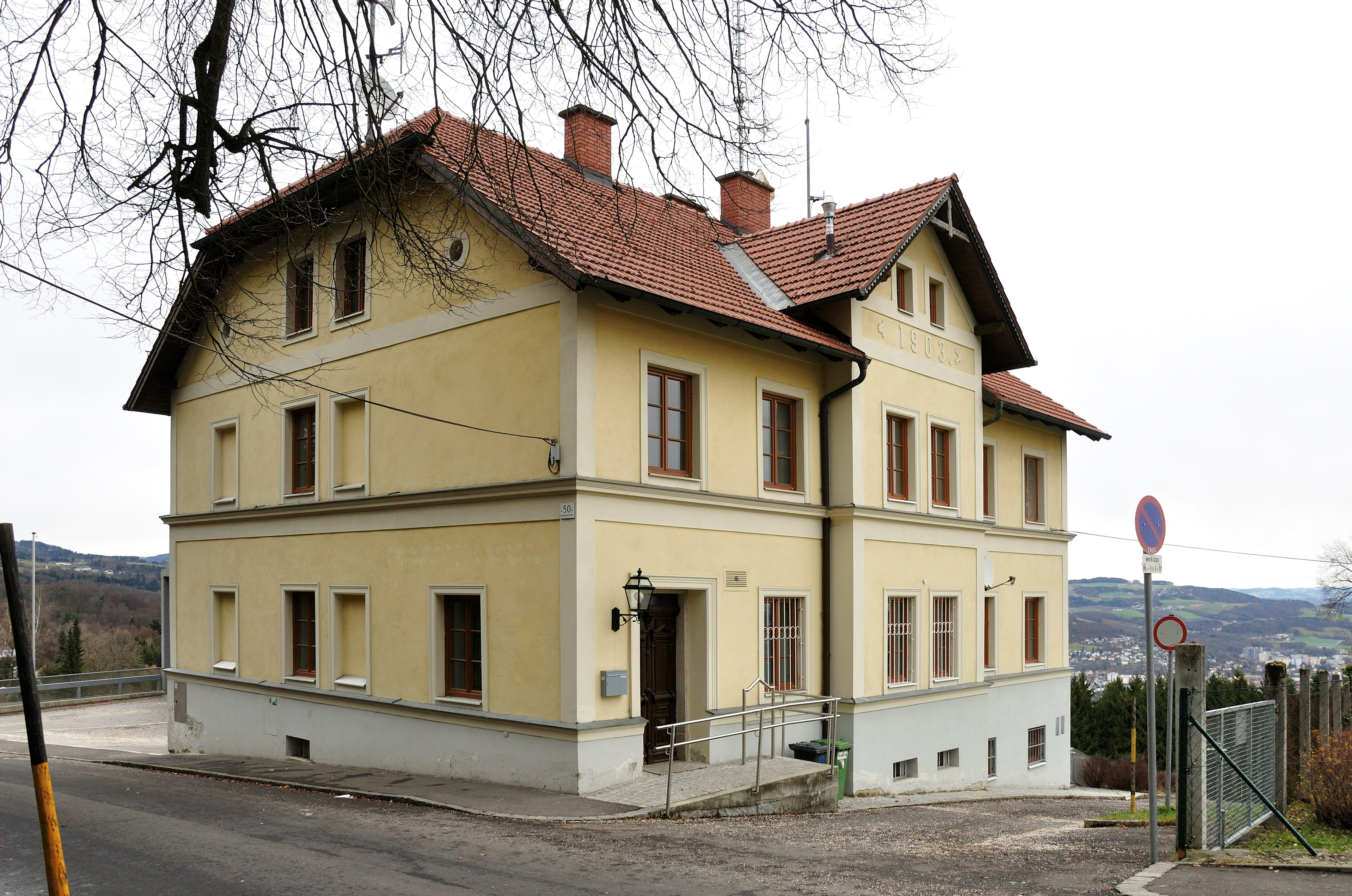 Feuerwehrgebäude, ehem. Amtsgebäude